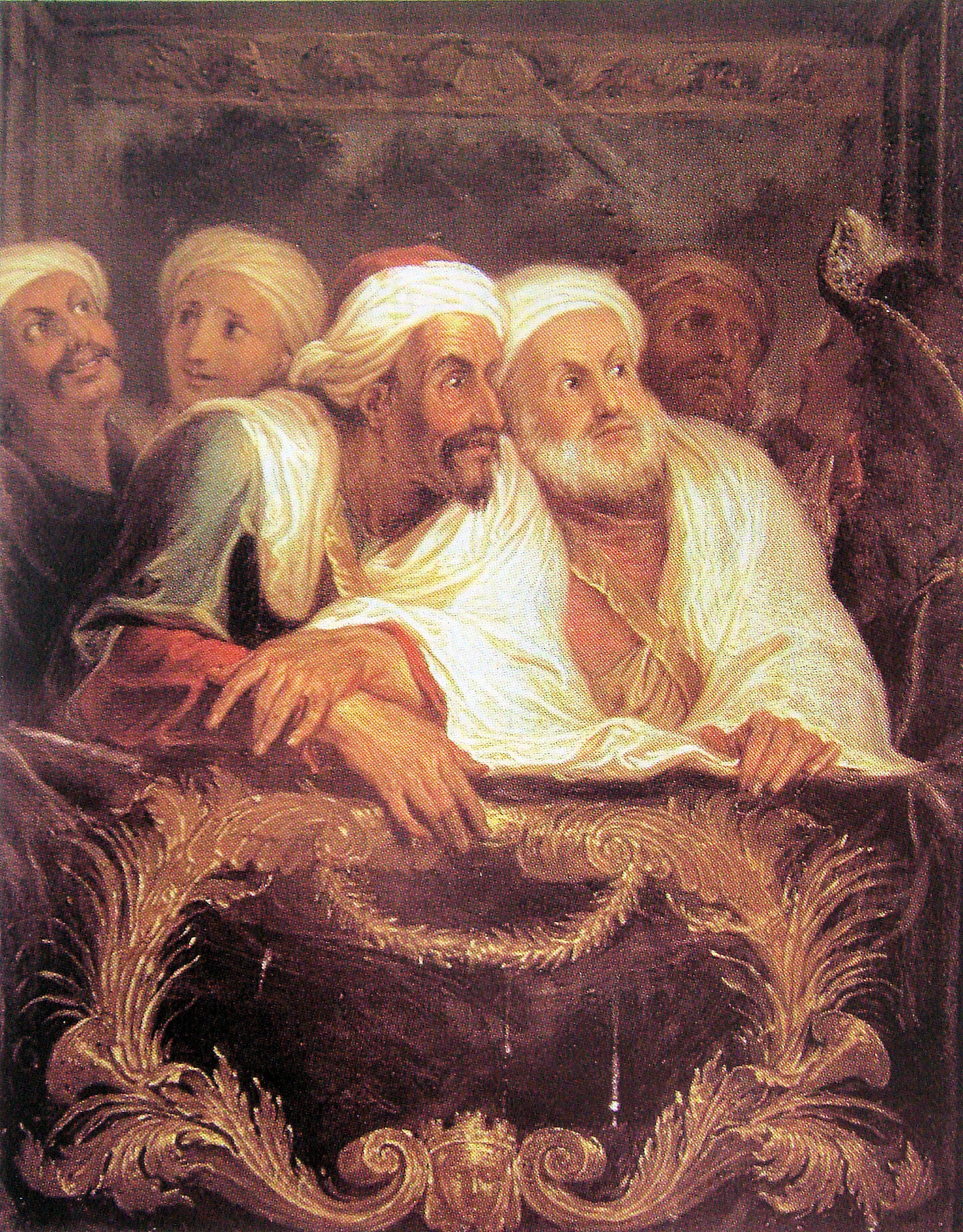 Antoine Coypel, (1661-1722).- Mohammed Tenim, Ambassadeur du Maroc à la Comedie Italienne,1682, Versailles.